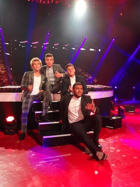 Feuerherz bei "Die Besten im Sommer" in Riesa